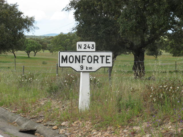 Antigo sinal na Estrada Nacional 243 - Portugal